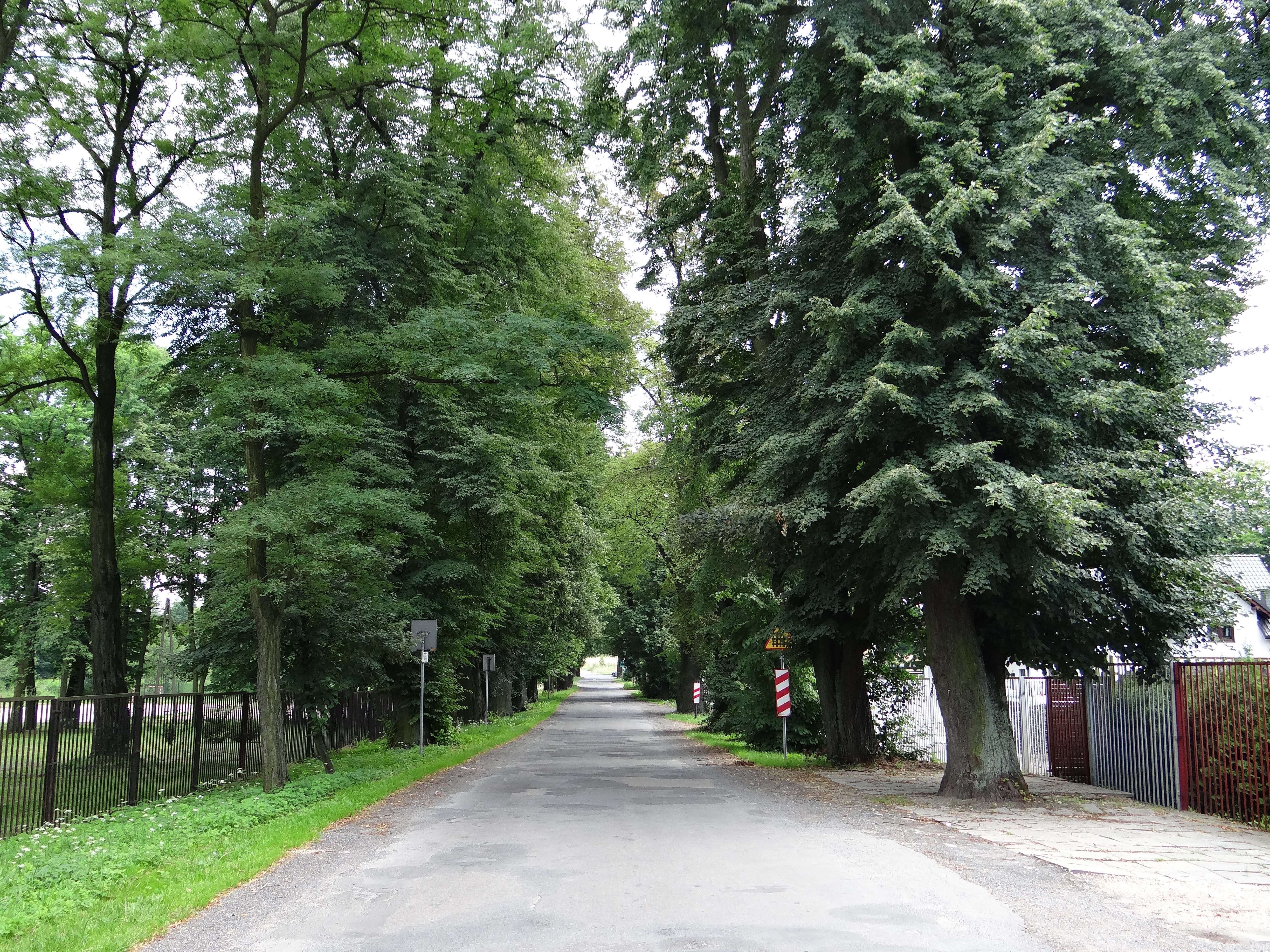 Wielkie Drogi, aleja dojazdowa, poł. XIX